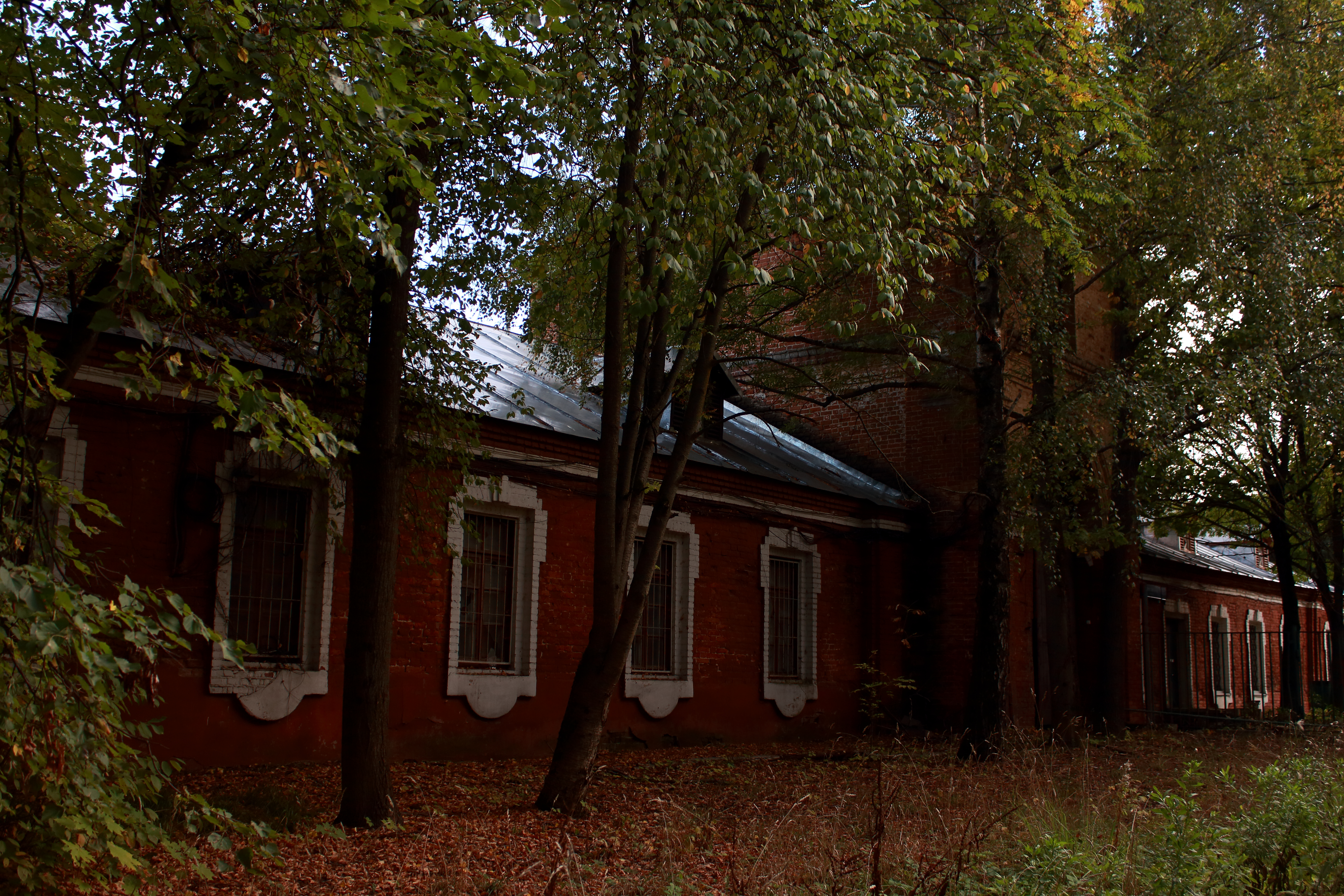 Конный двор: Профсоюзная ул., дом 123А, строение 7, Ясенево, Юго-Западный округ, Москва